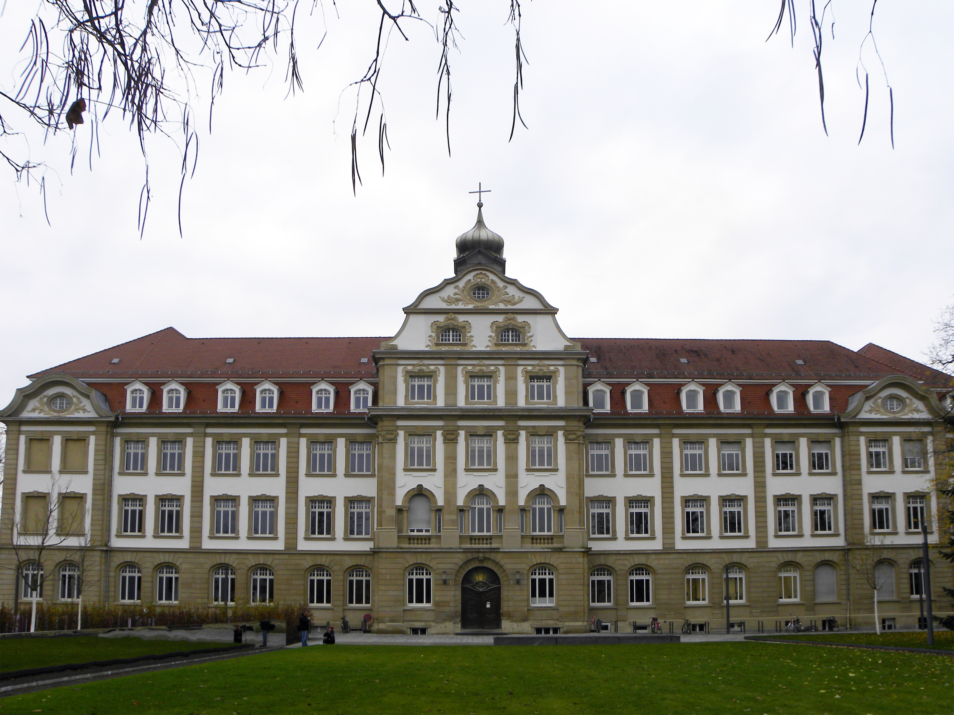 Victoriapensionat im Karlsruher Institute of Technology; aufgenommen im Rahmen der Fotojagd auf der WikiCon 2013